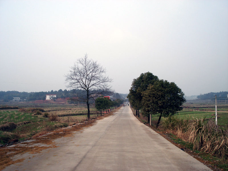 乡村路-道林镇-清石村